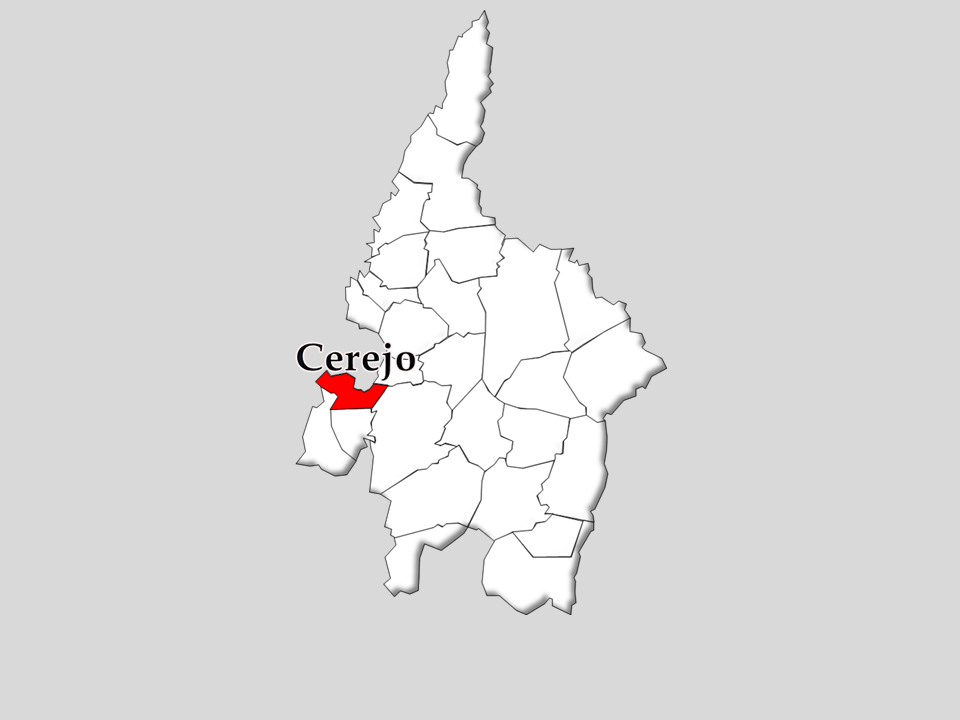 Censos 1864/2011